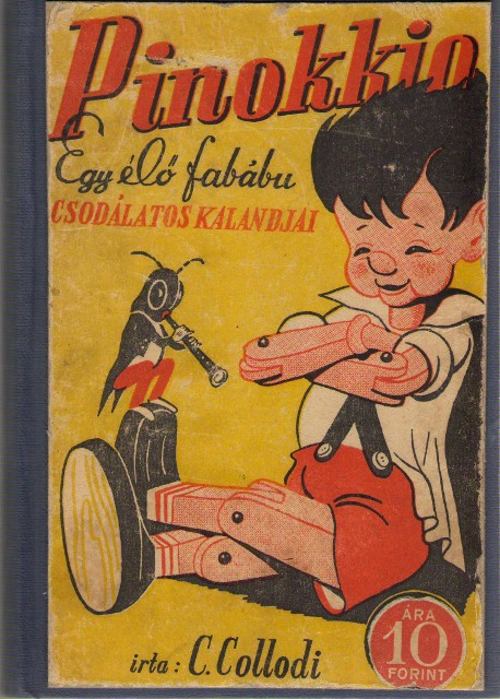 Pinokkio könyvborító